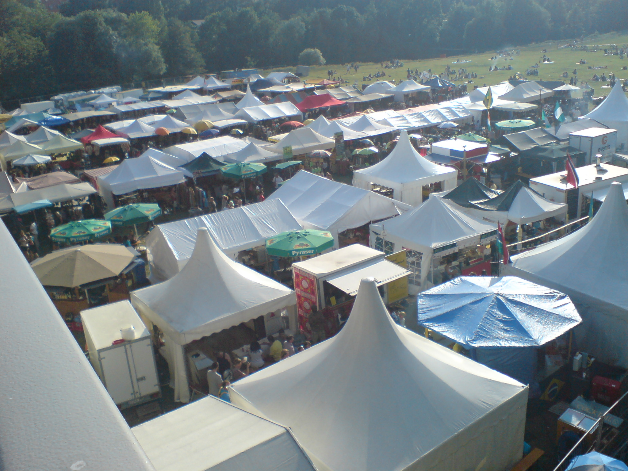 Afrika Festival 2015, Blick von Norden in Richtung Budenstadt der Aussteller